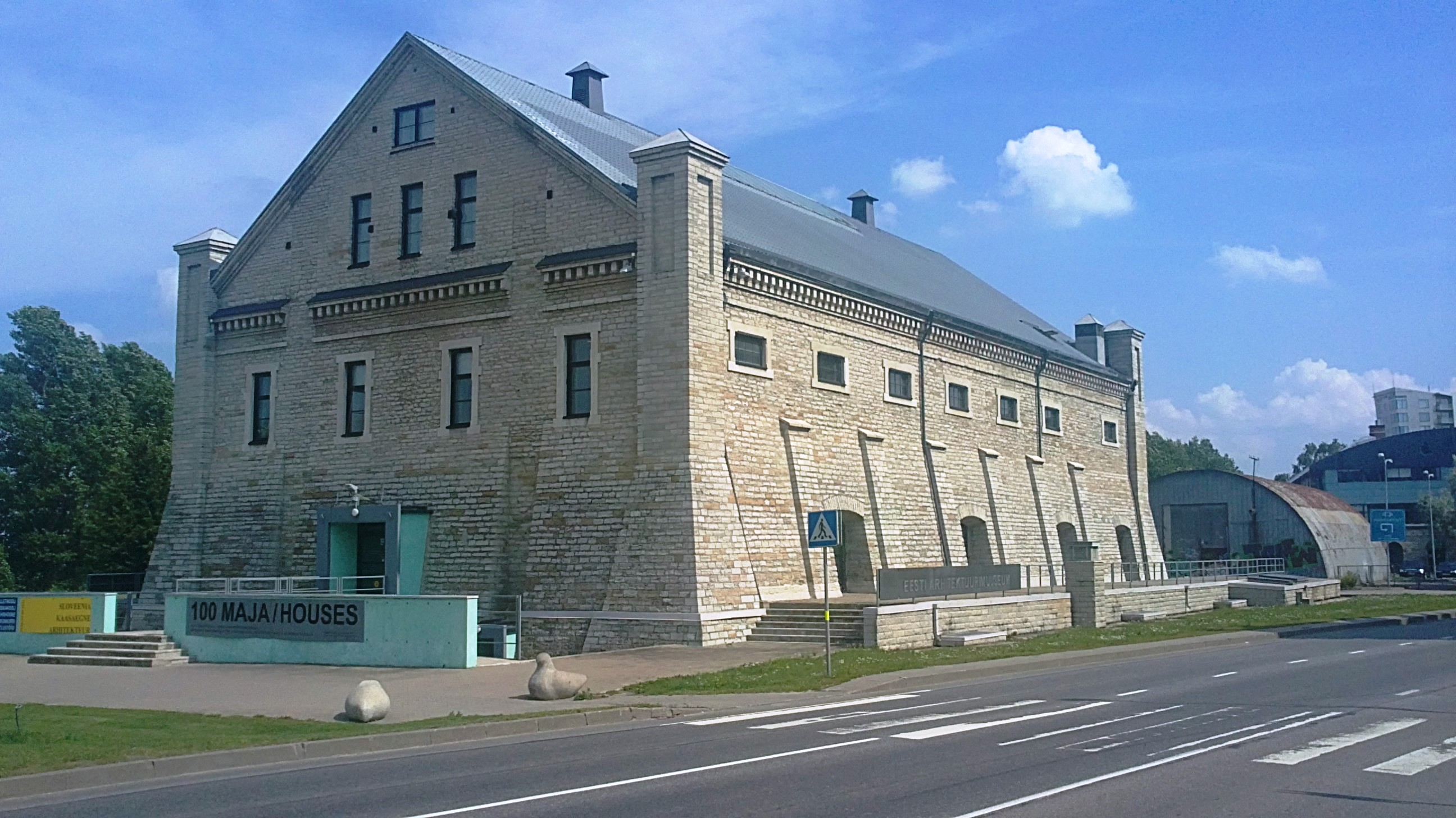 Tallinnas Ahtri tänaval asuv Rotermanni Soolaladu